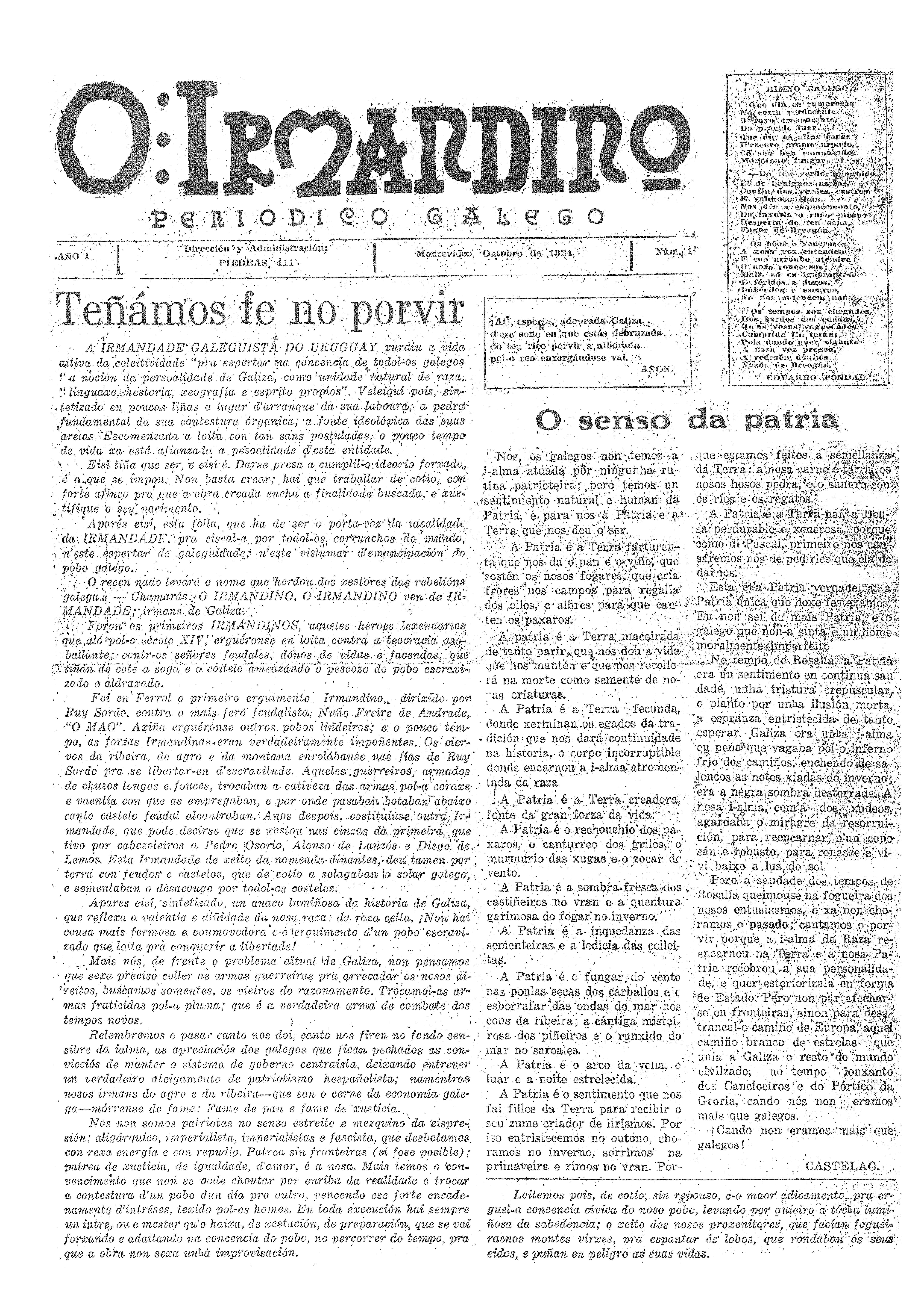 Portada do xornal O Irmandiño do número de outubro de 1934.